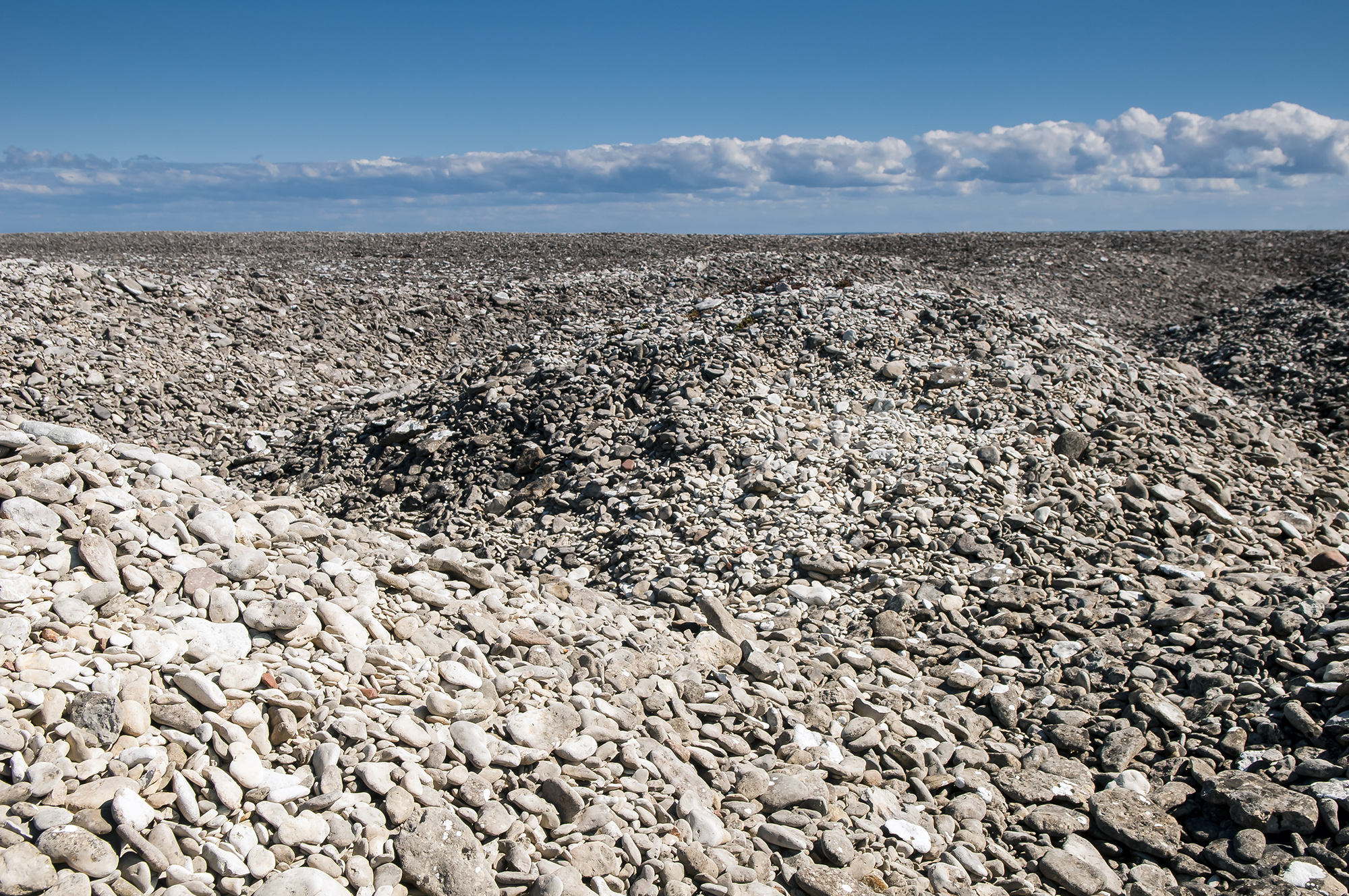 Osmussaare klibuvallid.